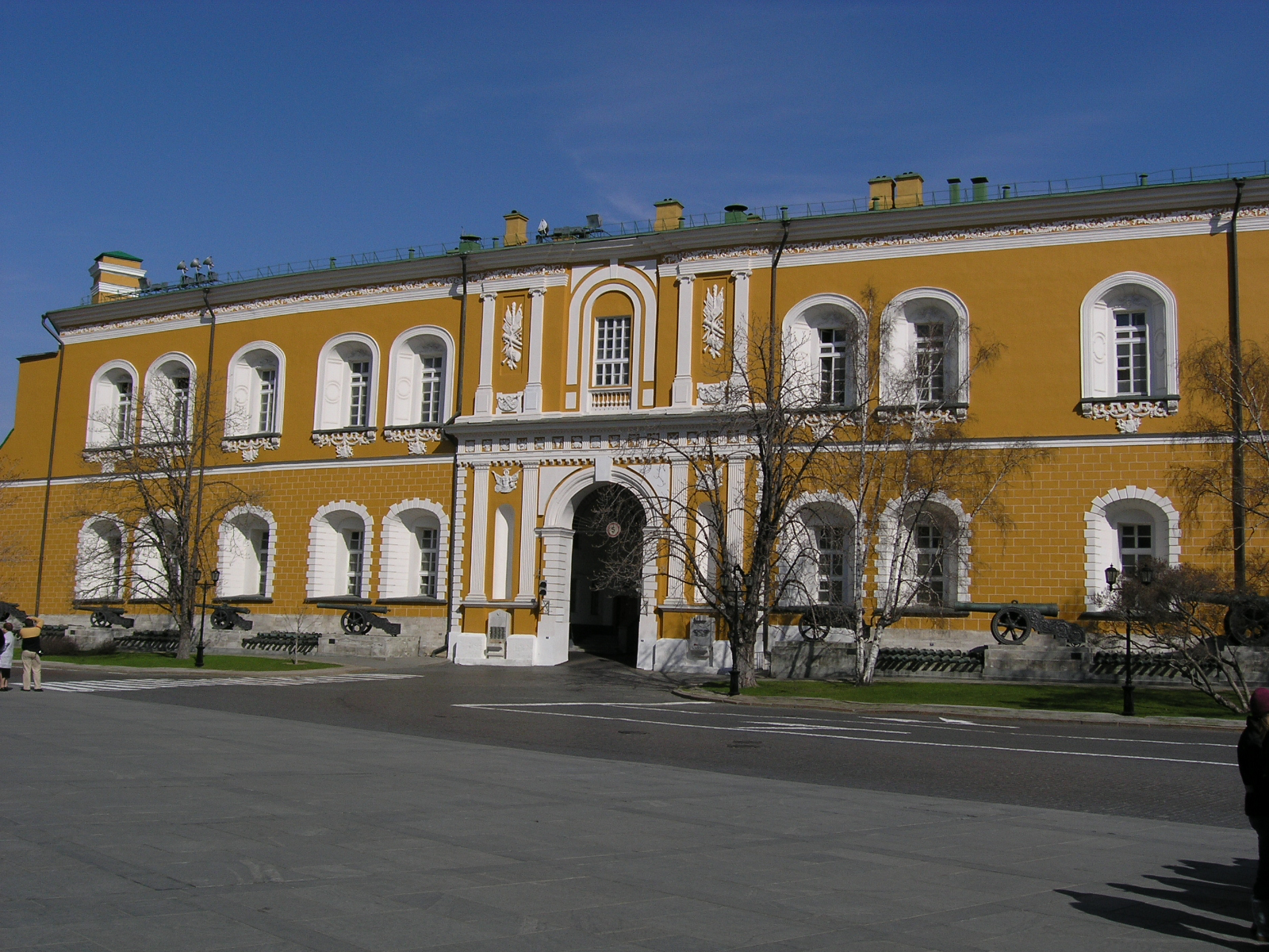 Arsenal, Südfassade.